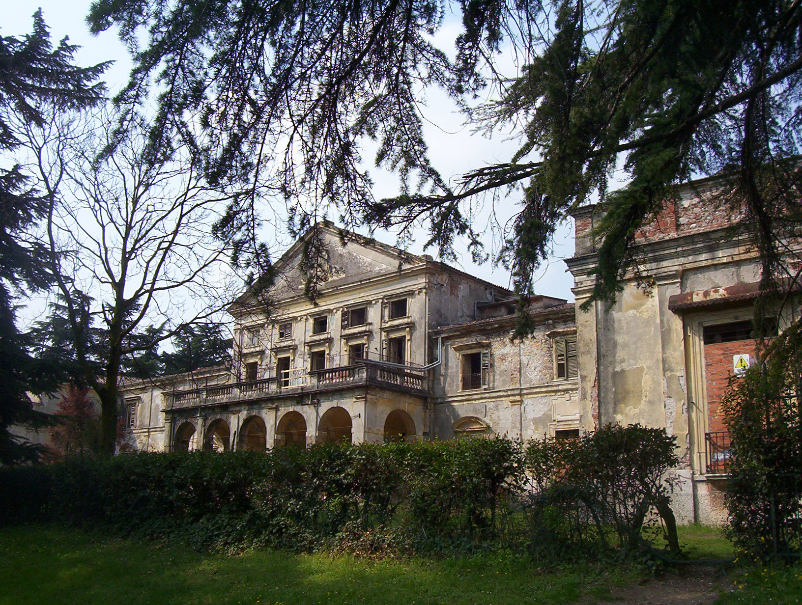 villa Pullè a Chievo (nel comune di Verona)